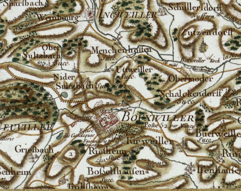 Carte cassini des environs de Bouxwiller (Bas-Rhin)